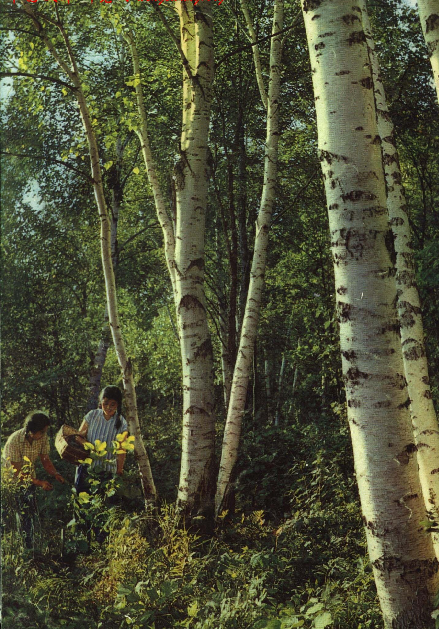 1964-12 1964年 完达山森林